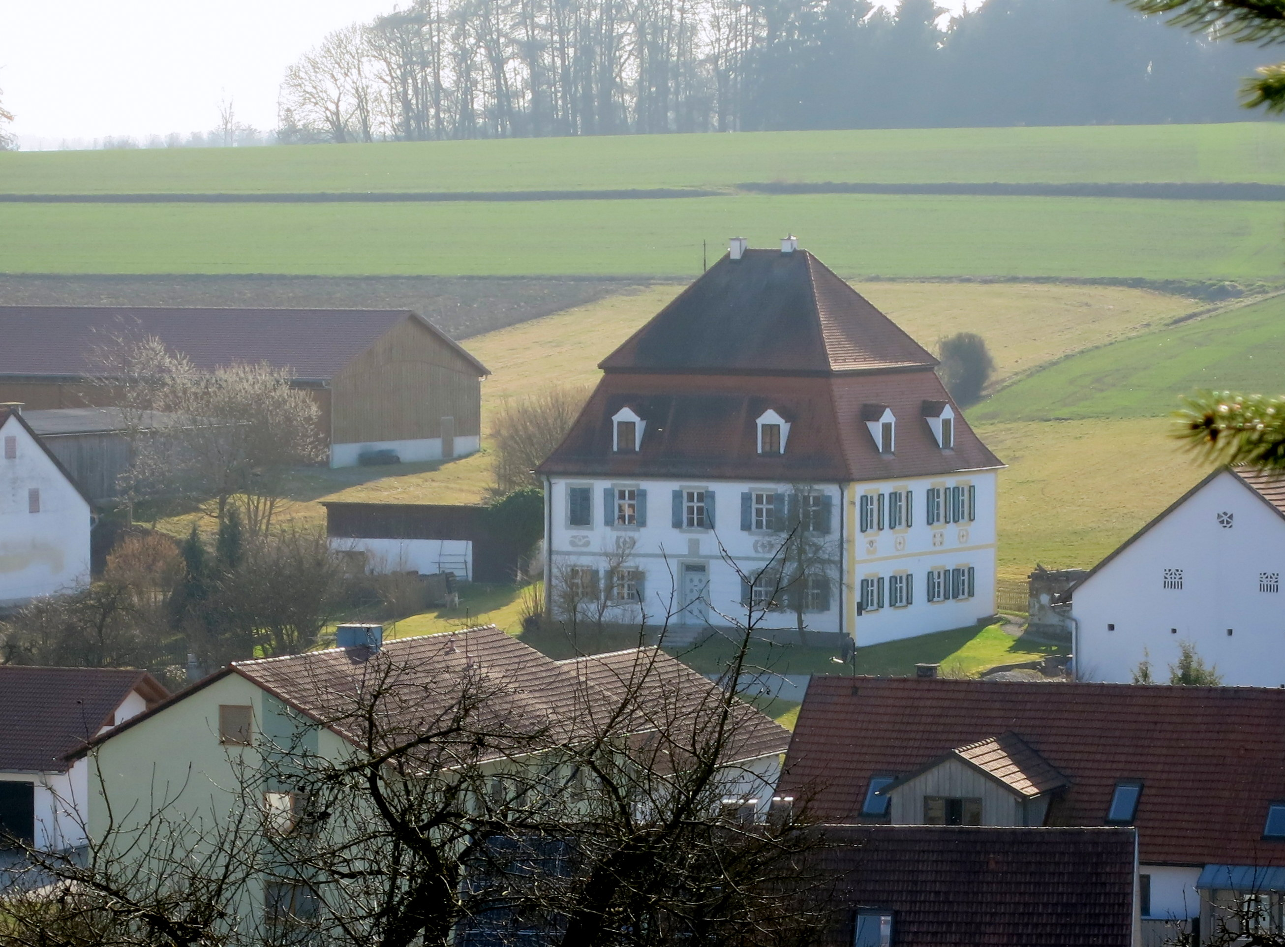 Ein barockes Hofmarkschloss in Privatbesitz